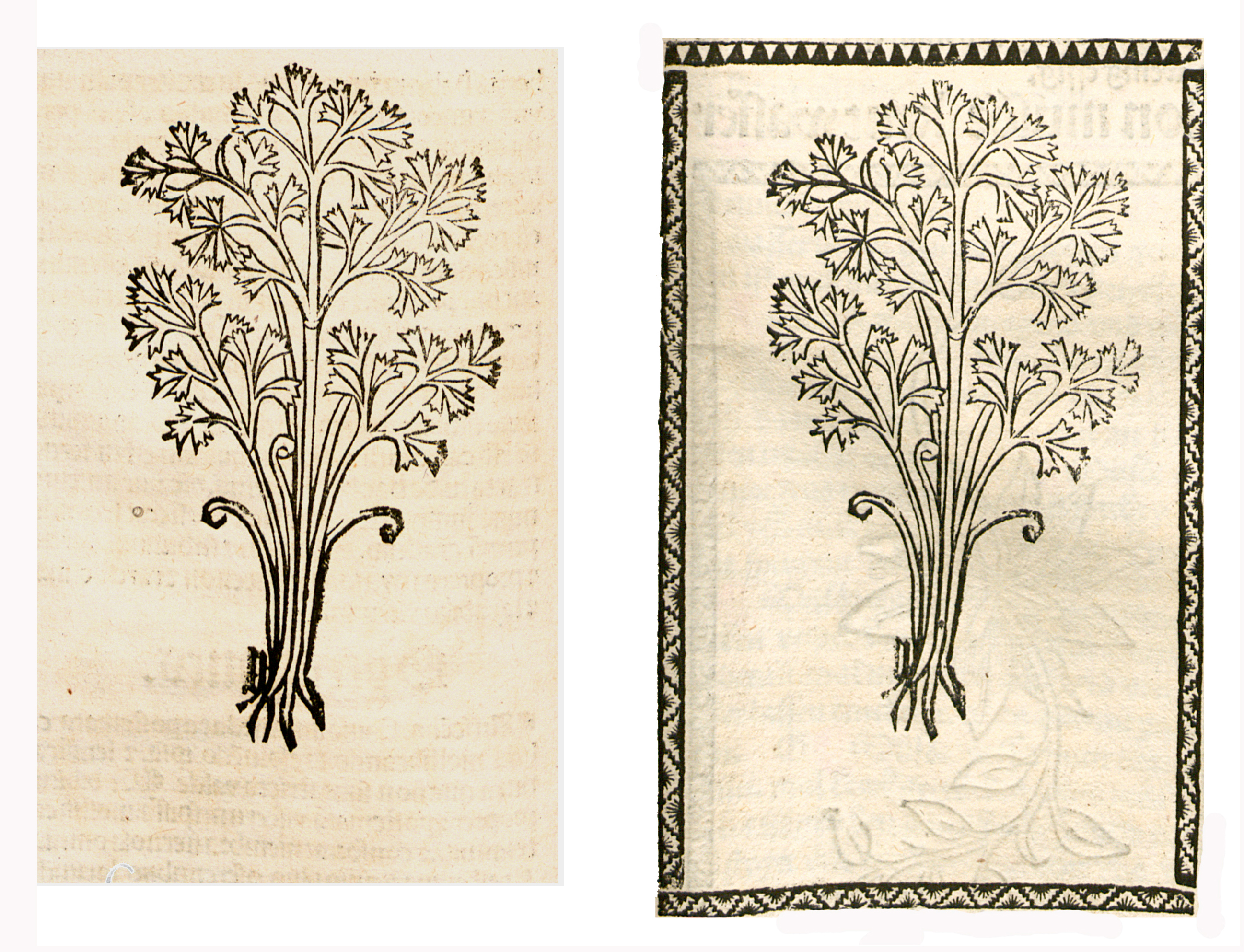 Abbildung von: Murruten (Asplenium ruta-muraria)